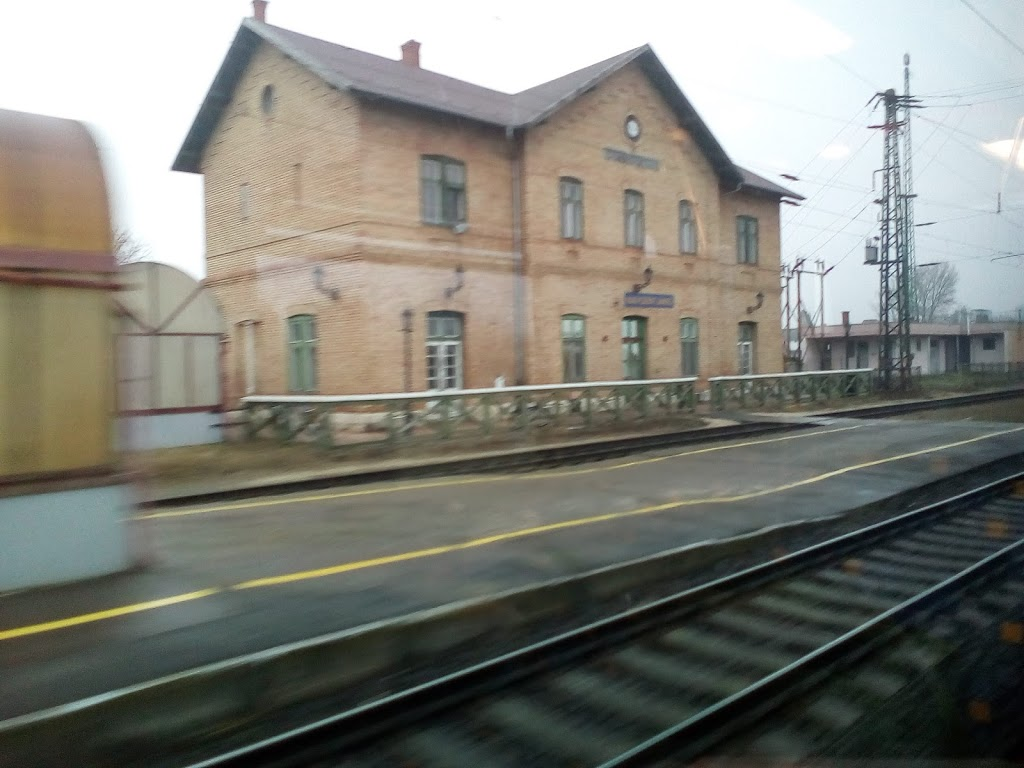 Nagyszentjános vasútállomás